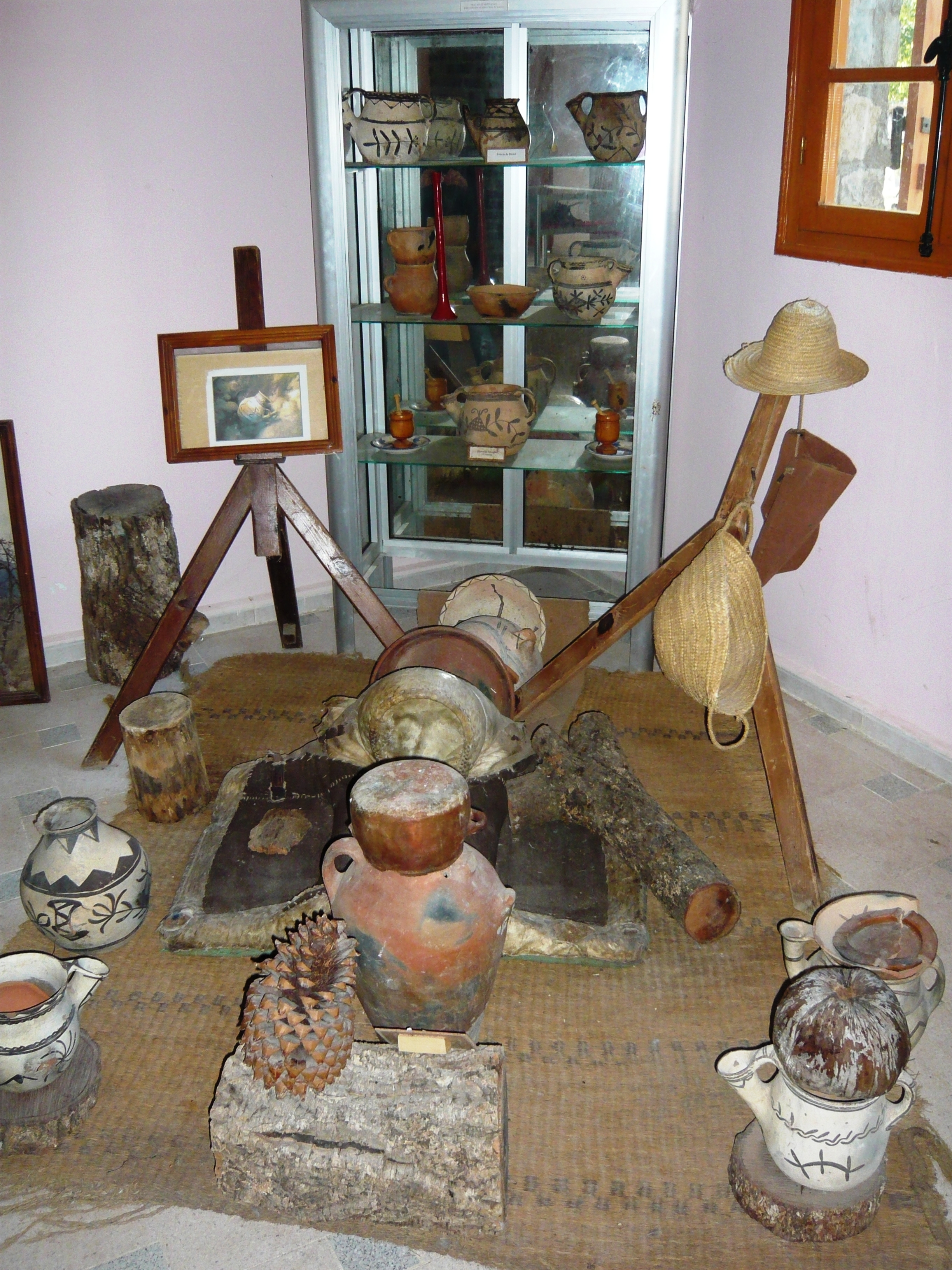 tradition de jijel outils Algérie en 2011 (c'est du mon propre travail et avec mon appareil photo)